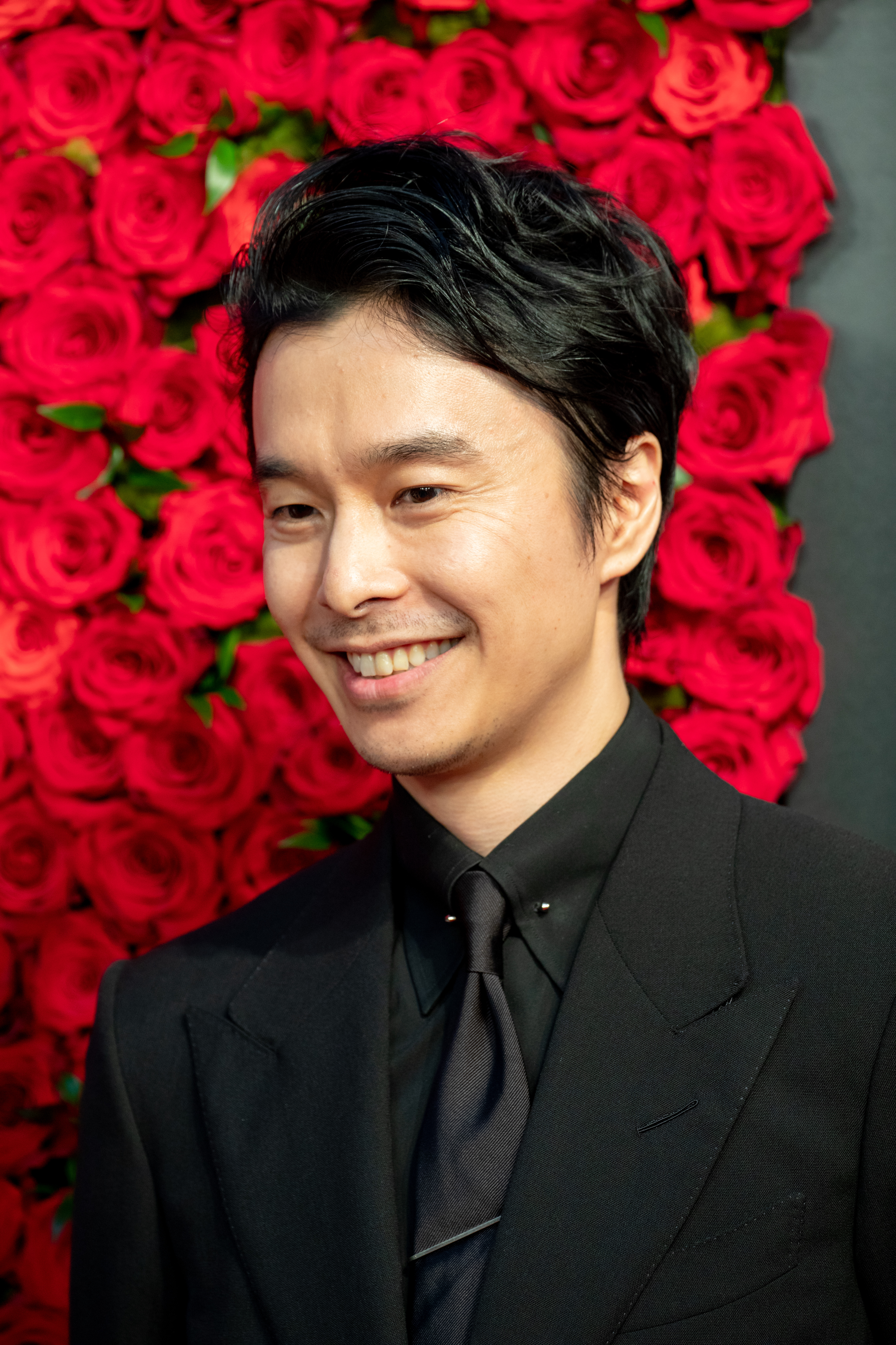 第30回 東京国際映画祭 オープニングセレモニー 長谷川博己 (碧朱)